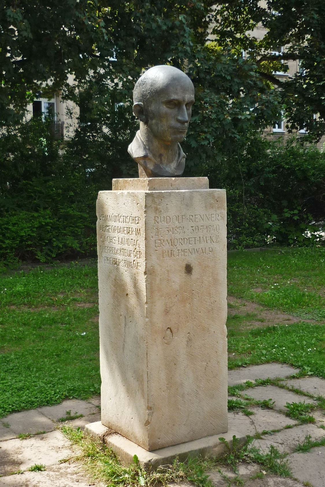 Rudolf-Renner-Denkmal auf dem Conertplatz in Dresden-Löbtau